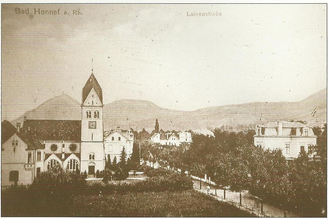 Luisenstraße mit evangelischer Pfarrkirche in Honnef, im Hintergrund das Siebengebirge